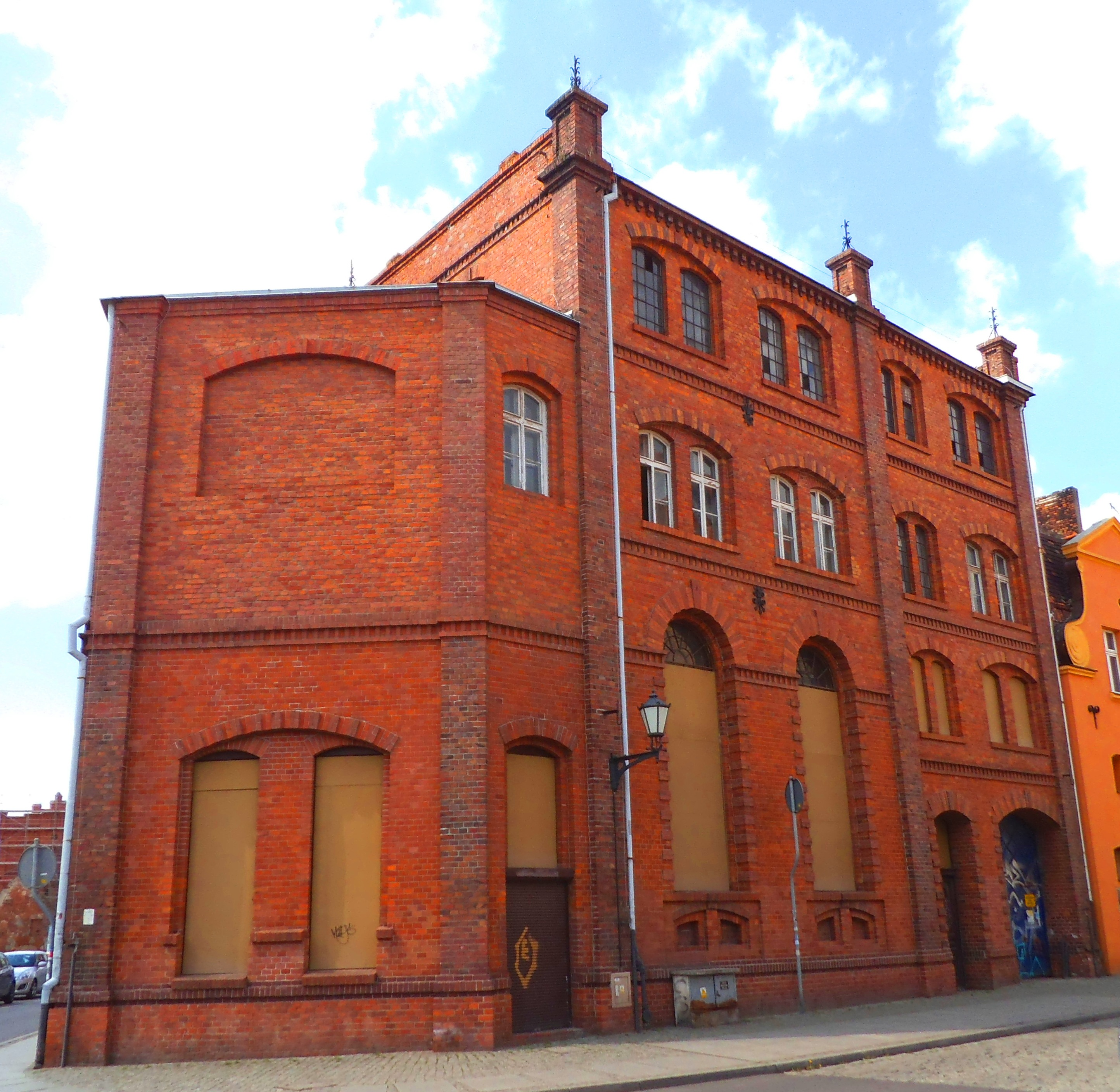 Stary Browar w Toruniu1